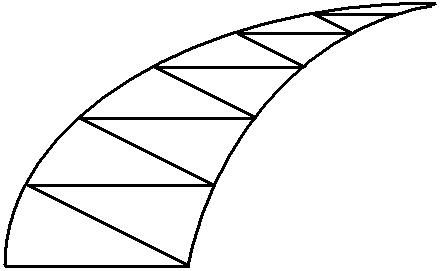 中文（台灣）: 中國、朝鮮流傳的牛角棋